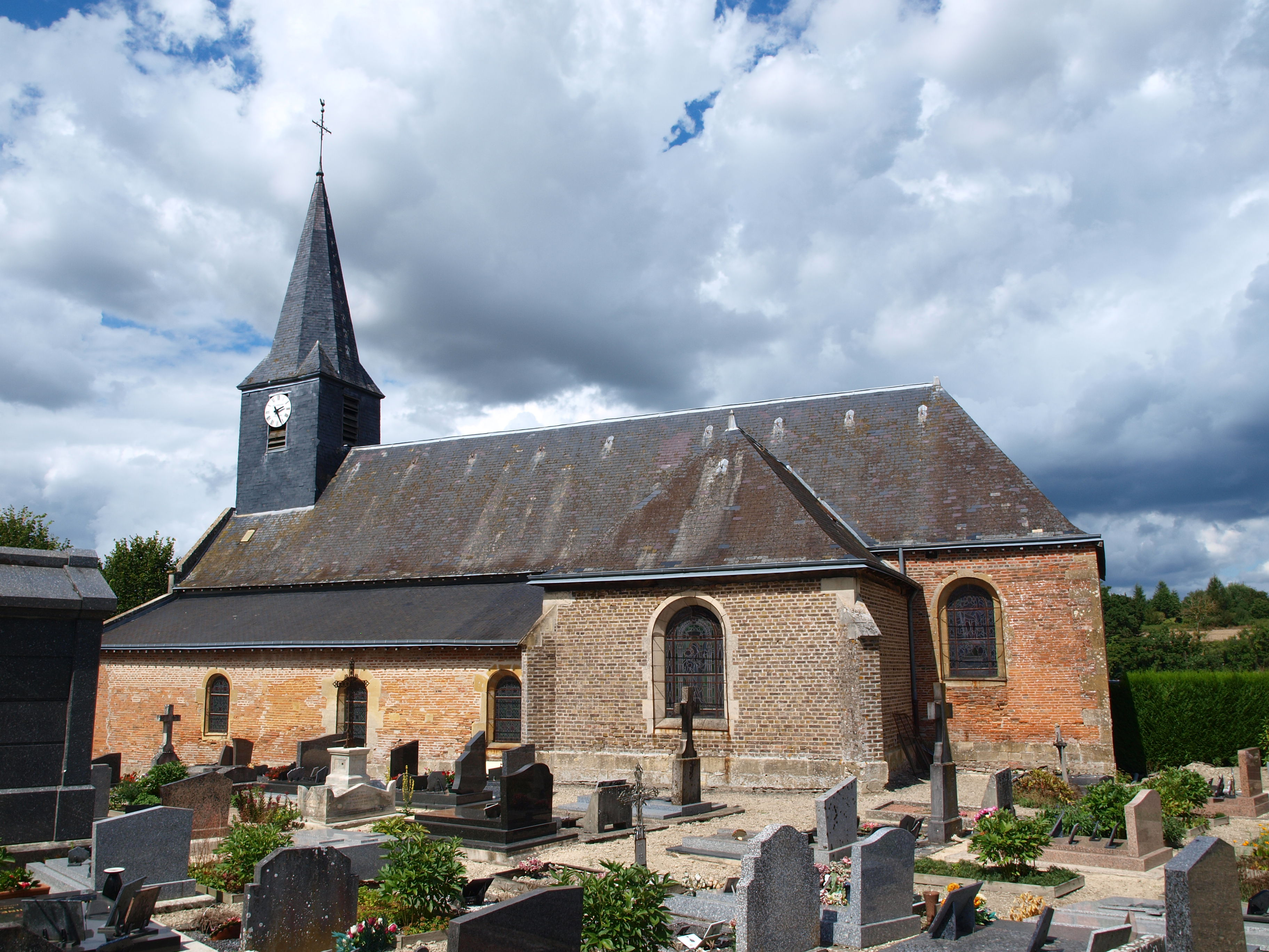 Condé-lès-Autry (Ardennes, France) ; l'église romane